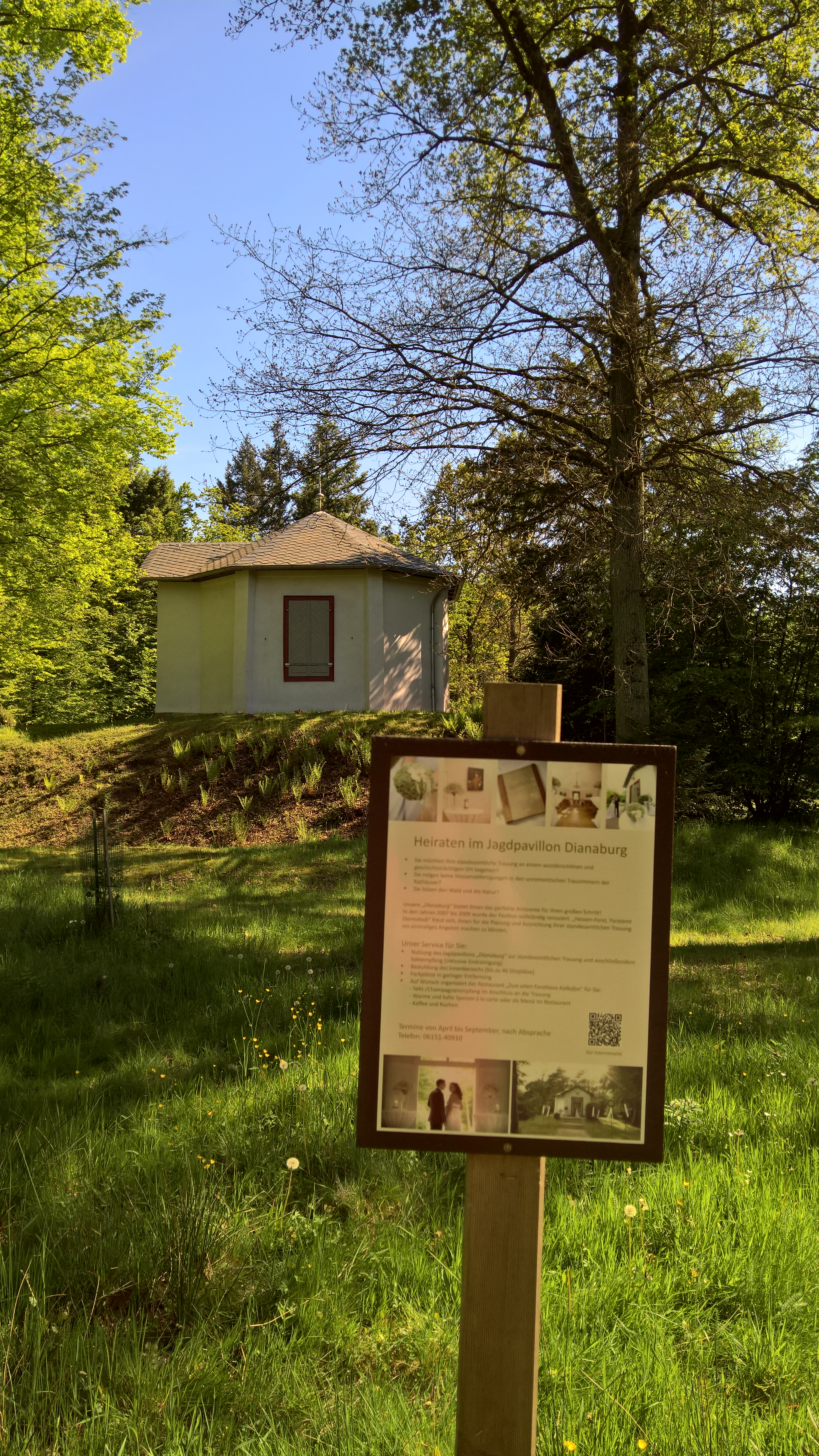 Die Dianaburg, mit "Hochzeits"tafel, aus Richtung Norden